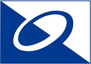 민주자유당 로고 (출처: Commons Wiki)